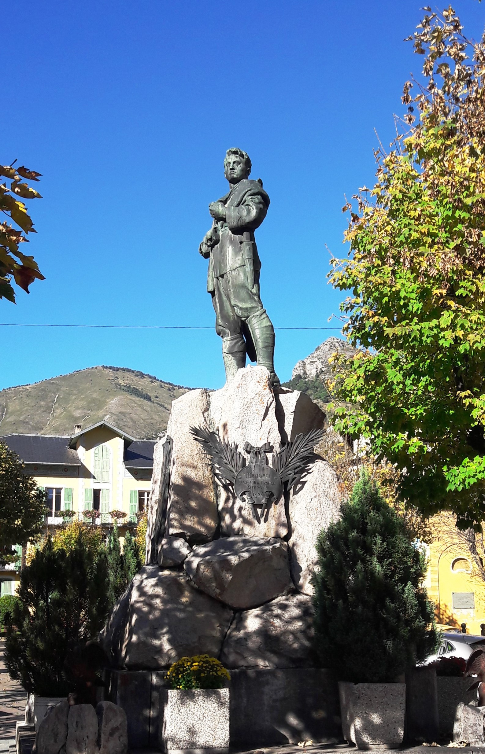 Monument aux morts de Tende (Alpes maritimes, France)